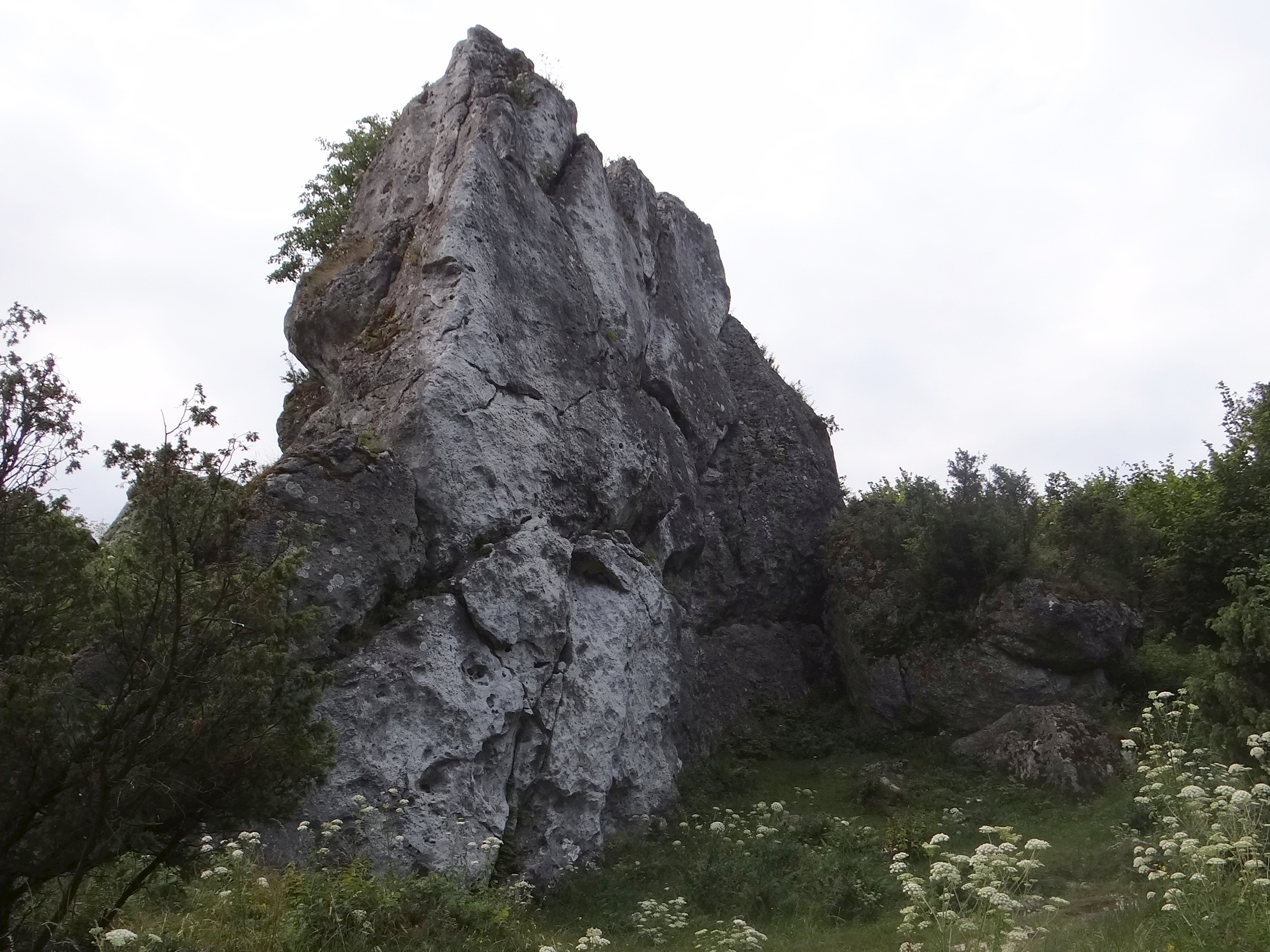 Chomicza skała na Gorze Zborów w Podlesicach